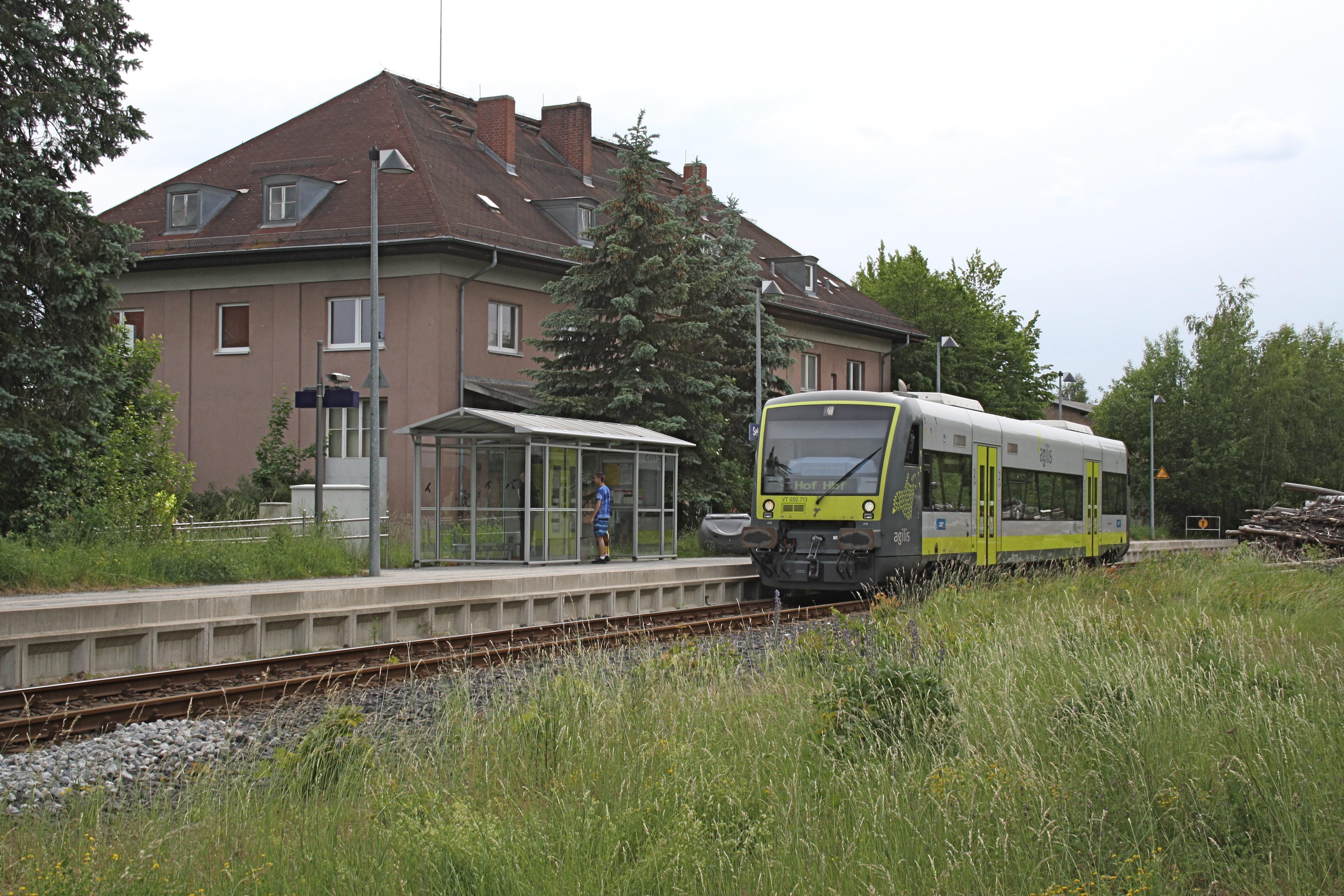 Bahnhof Selb Stadt